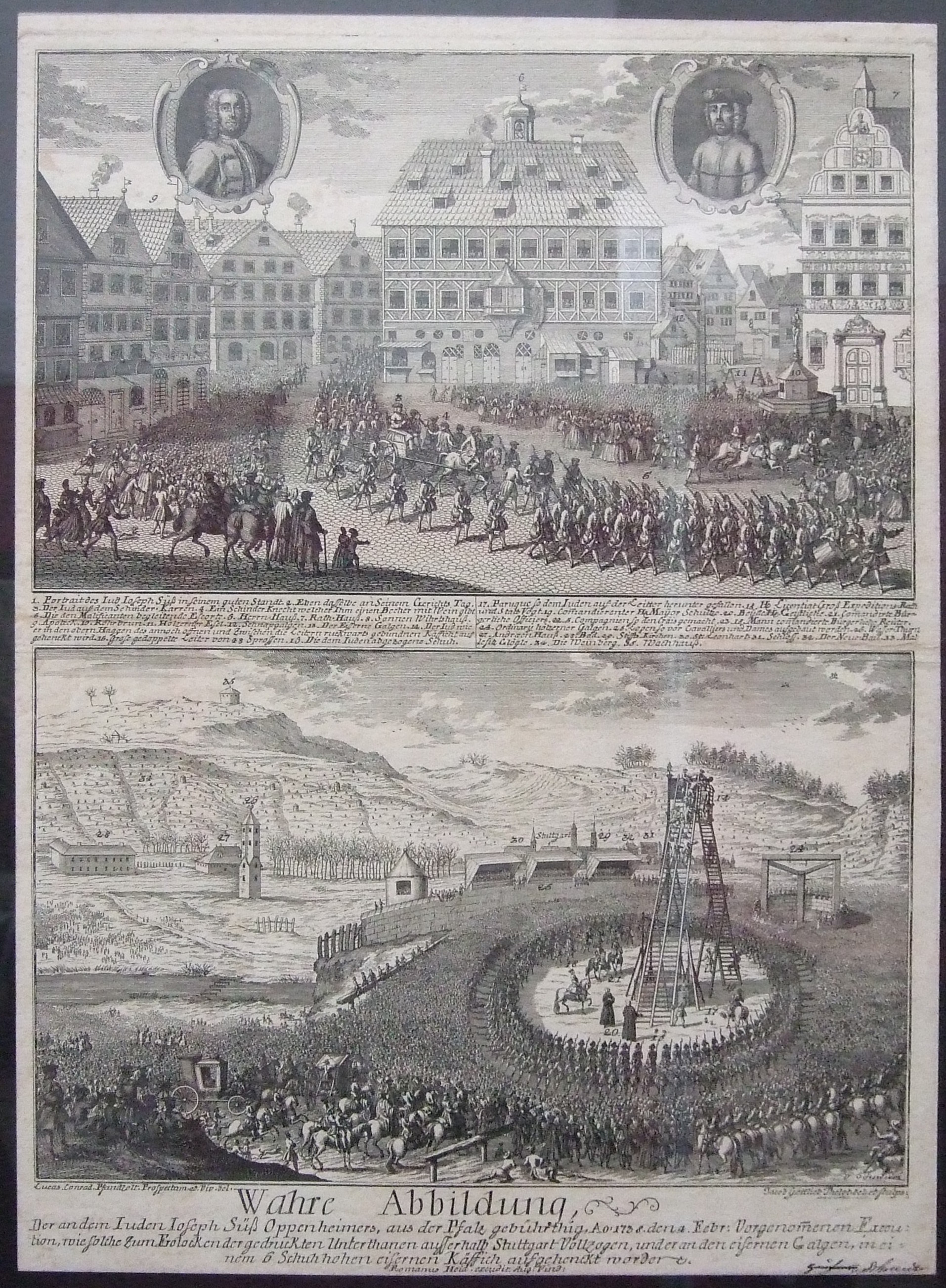 Joseph Süß Oppenheimer - Hinrichtung